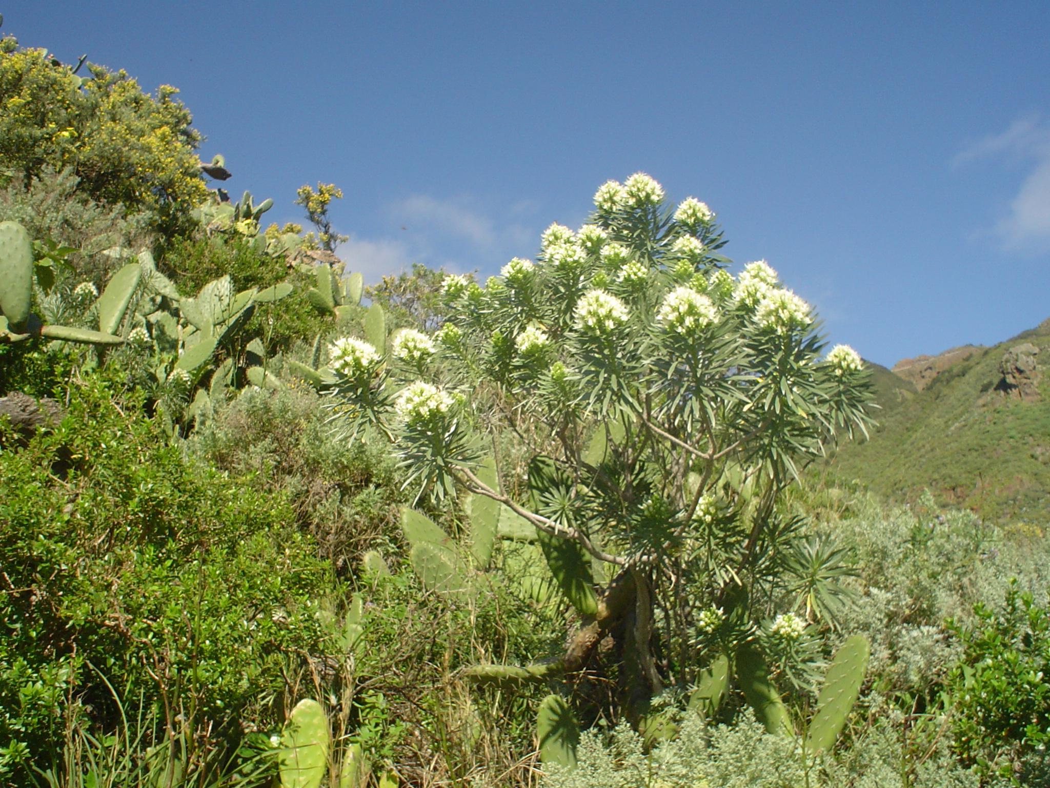 Fotografía de ejemplar de Echium leucophaeum en floración tomada en el Valle de San Andrés.